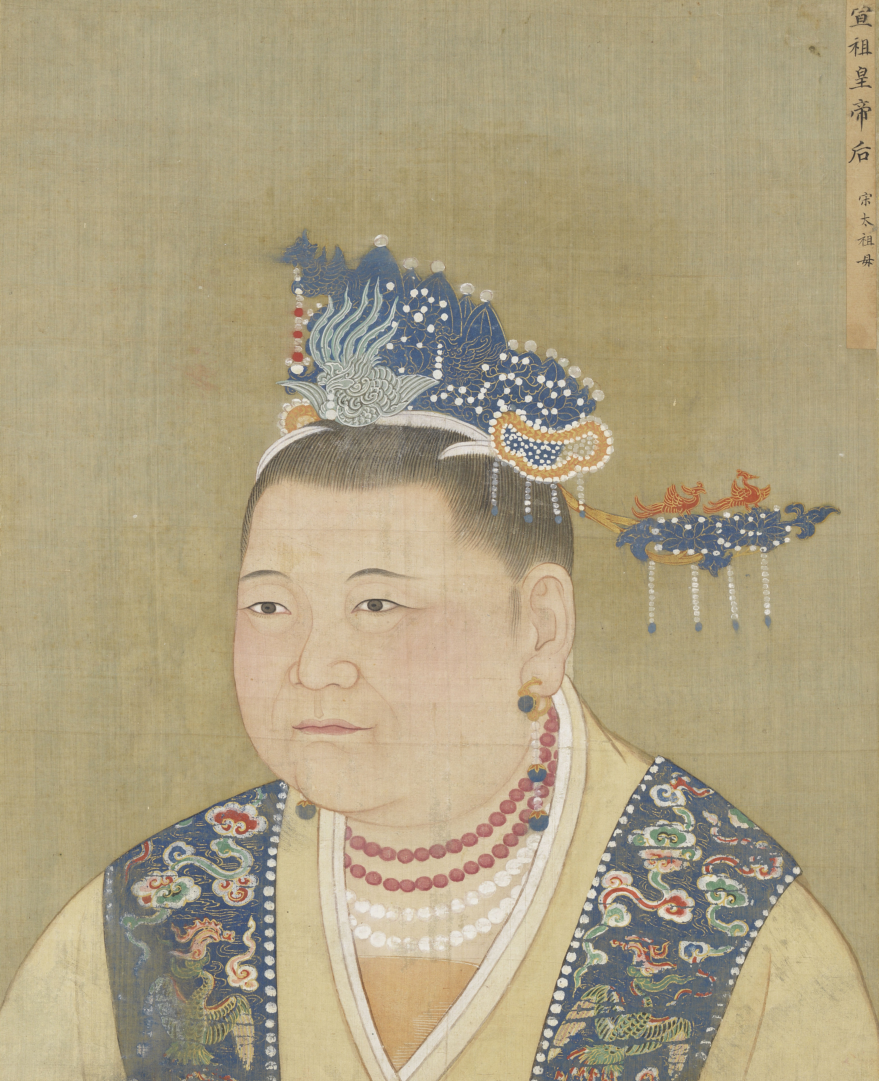 宋代后半身像 冊 宣祖后